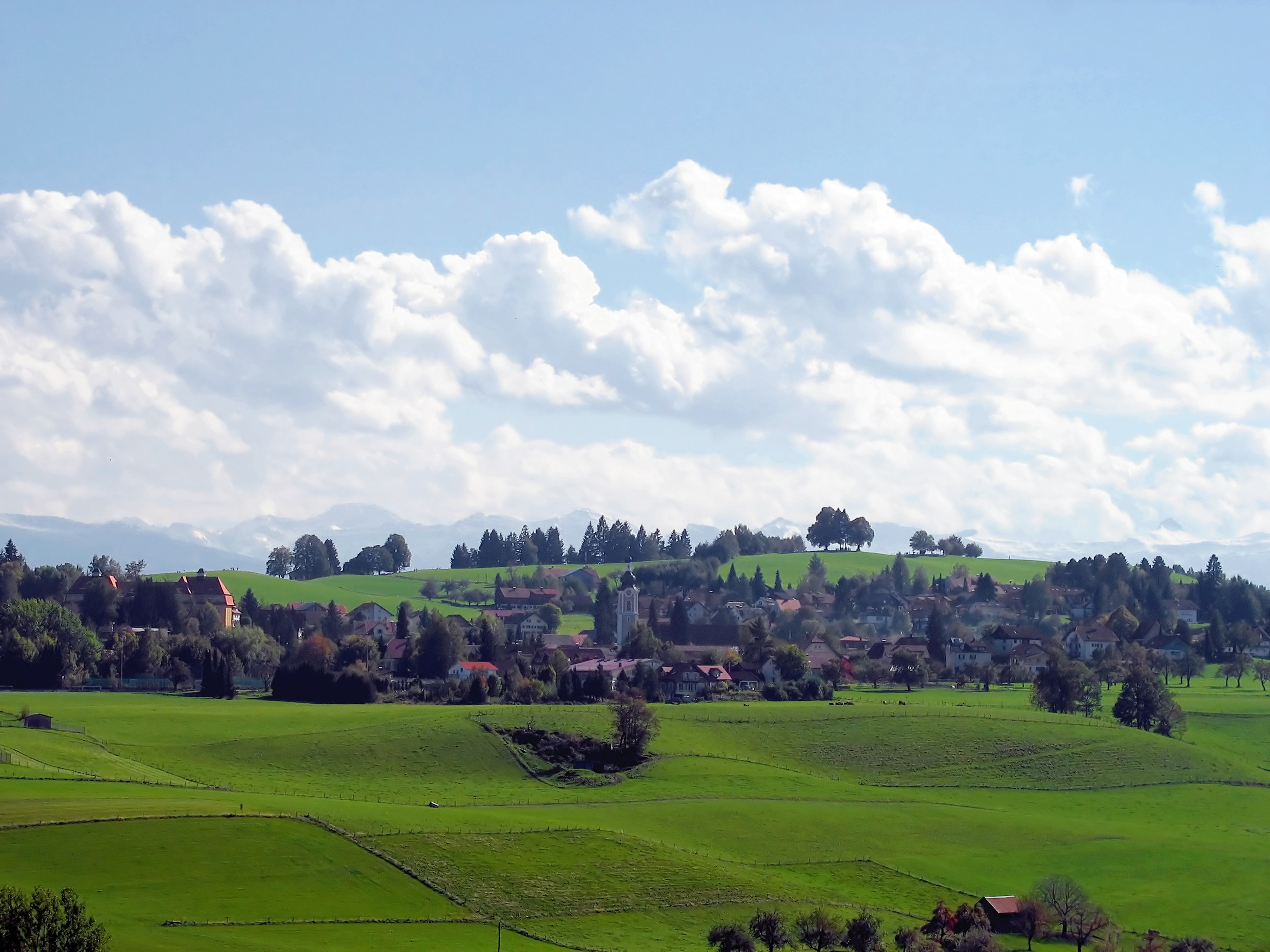 Scheidegg Allgäu Fotografiert vom Kreuzberg Höhenweg